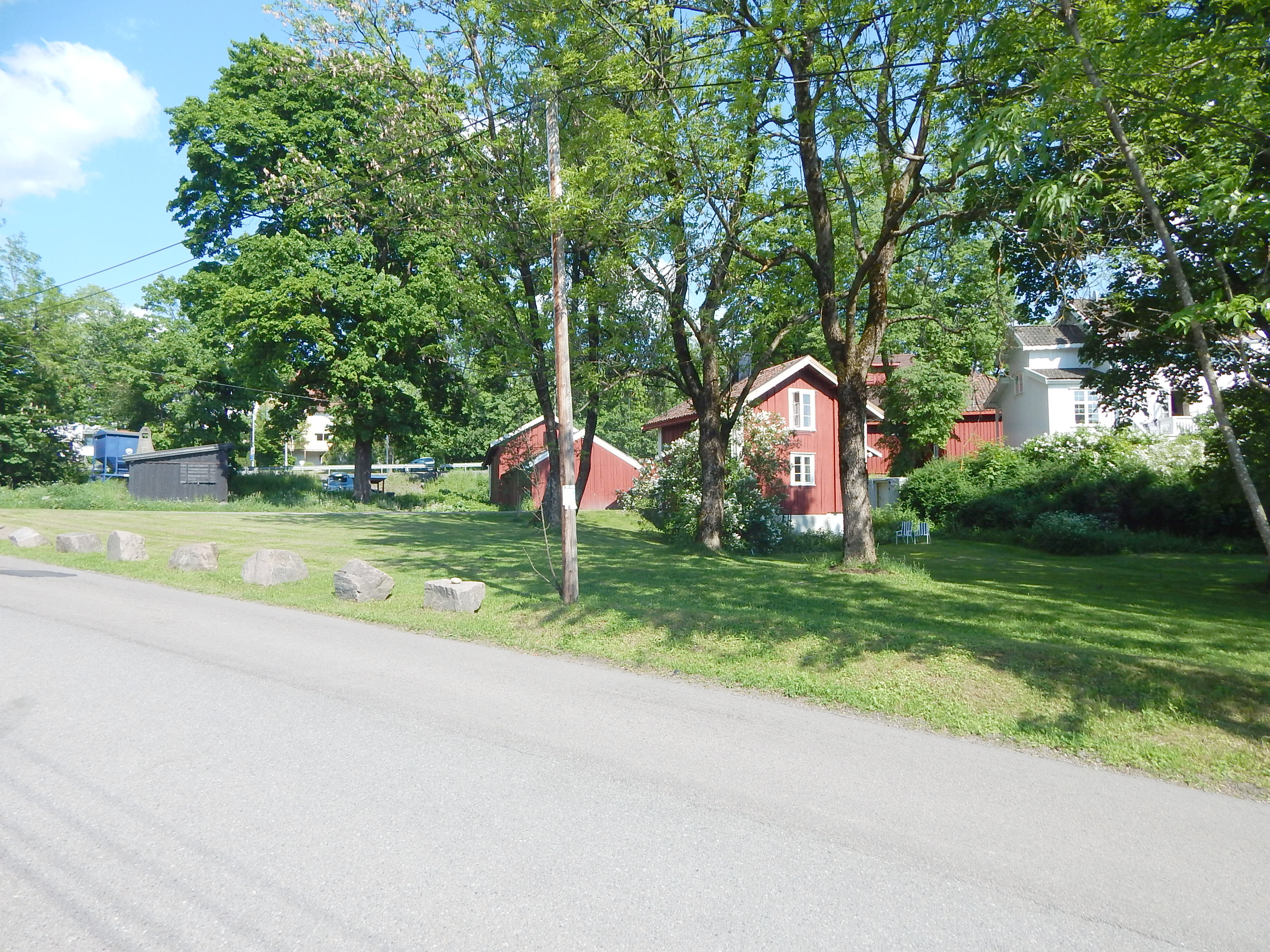 Sollerudveien forbi Lilleaker gård